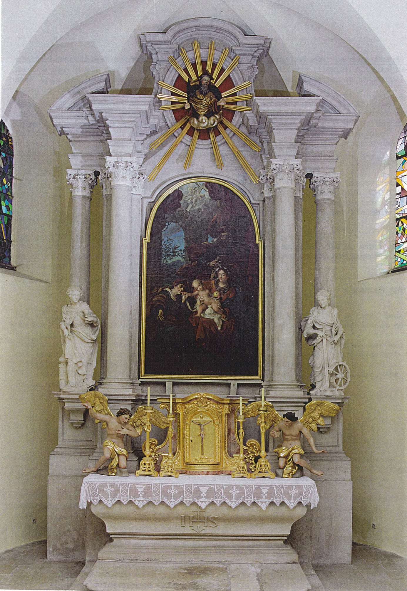 Hochaltar2